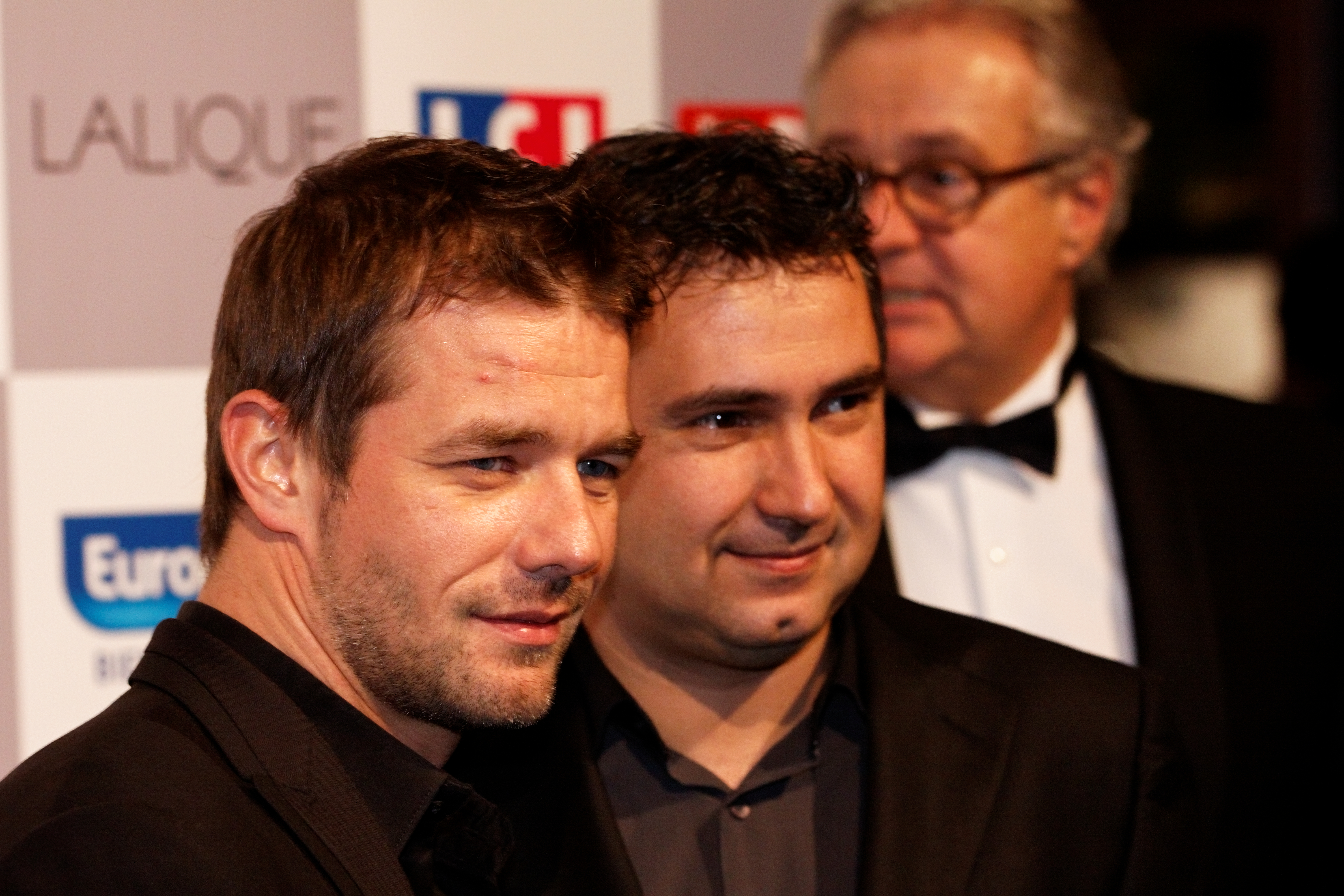 Sébastien Loeb et Daniel Elena lors du photocall du festival automobile international 2012